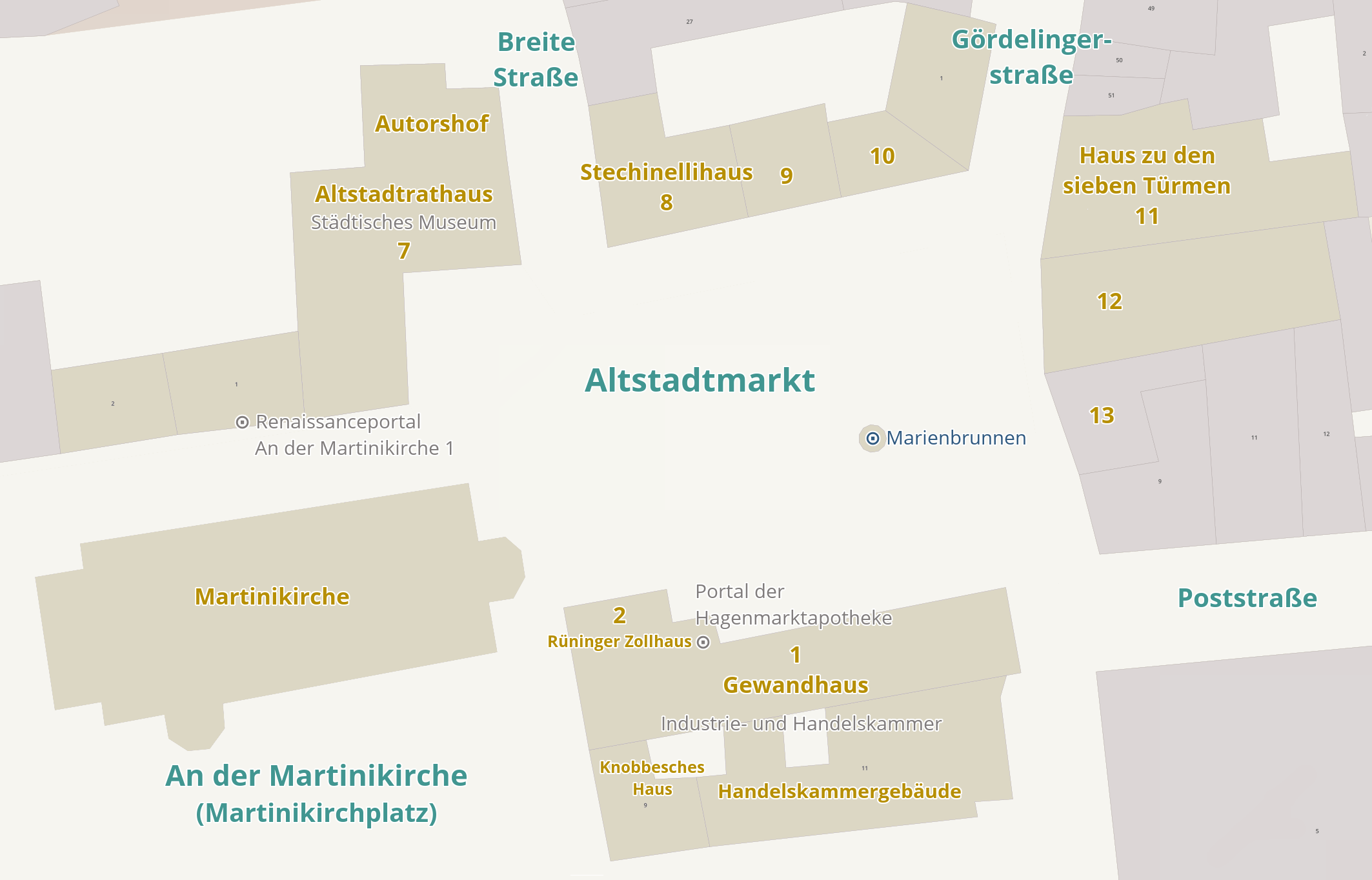 Plan des Baudenkmals Altstadtmarkt in Braunschweig mit seinen Bauwerken. Die Kulturdenkmale sind gelblich eingezeichnet.